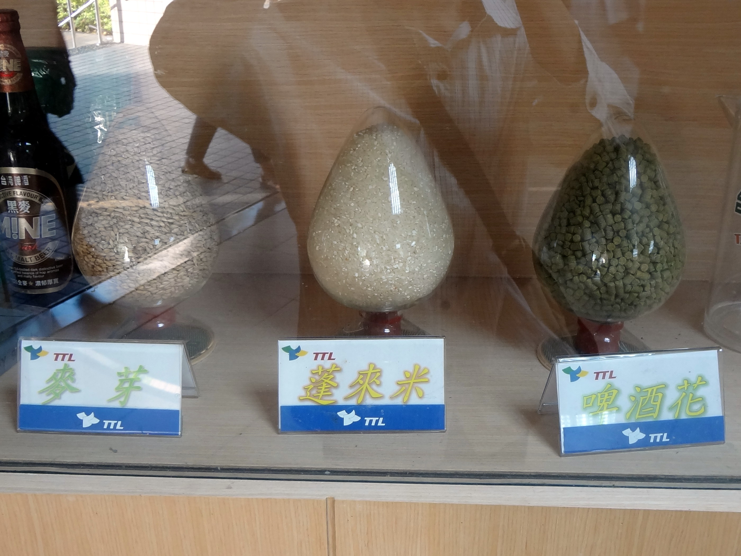 臺灣菸酒公司竹南啤酒廠產品推廣中心展示的啤酒原料：麥芽、蓬萊米、啤酒花。